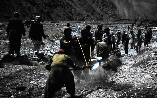 Onderhoud aan irrigatie-inlaat, Baluchistan